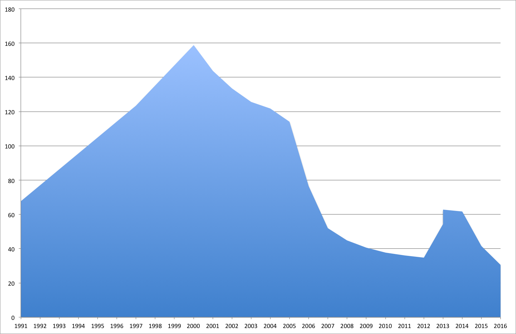 График динамики государственного долга России, с 1991 по 2016 годы (только январь)